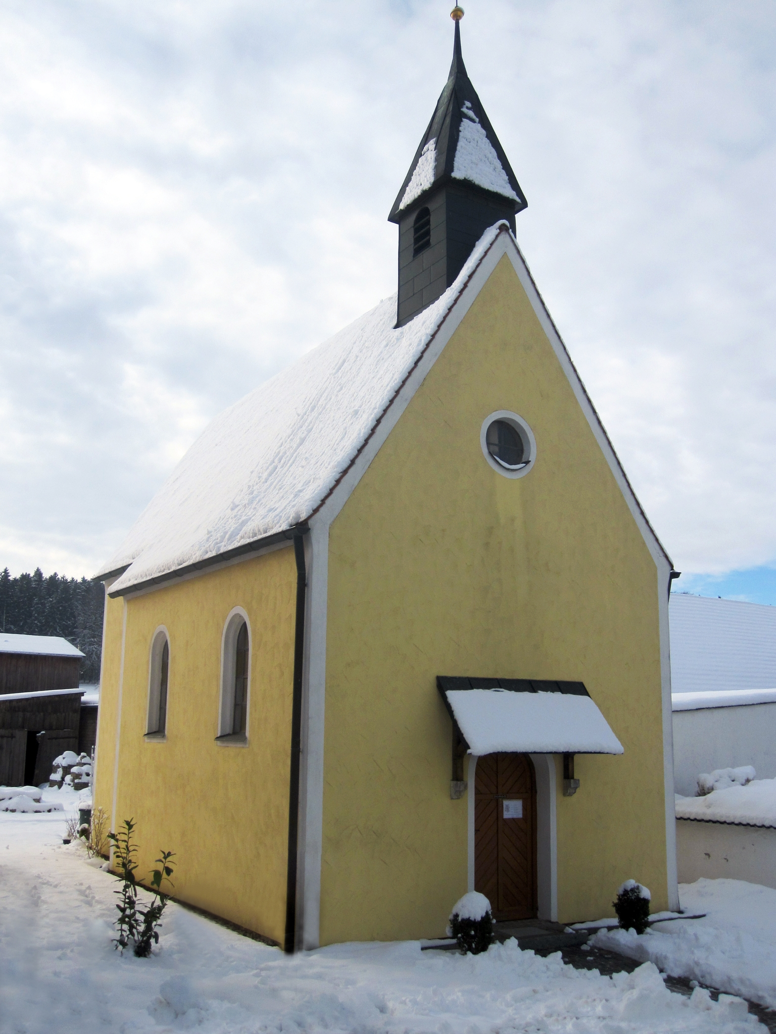 Kapelle St. Peter und Paul in Winn, Gemeindebereich 92358 Seubersdorf